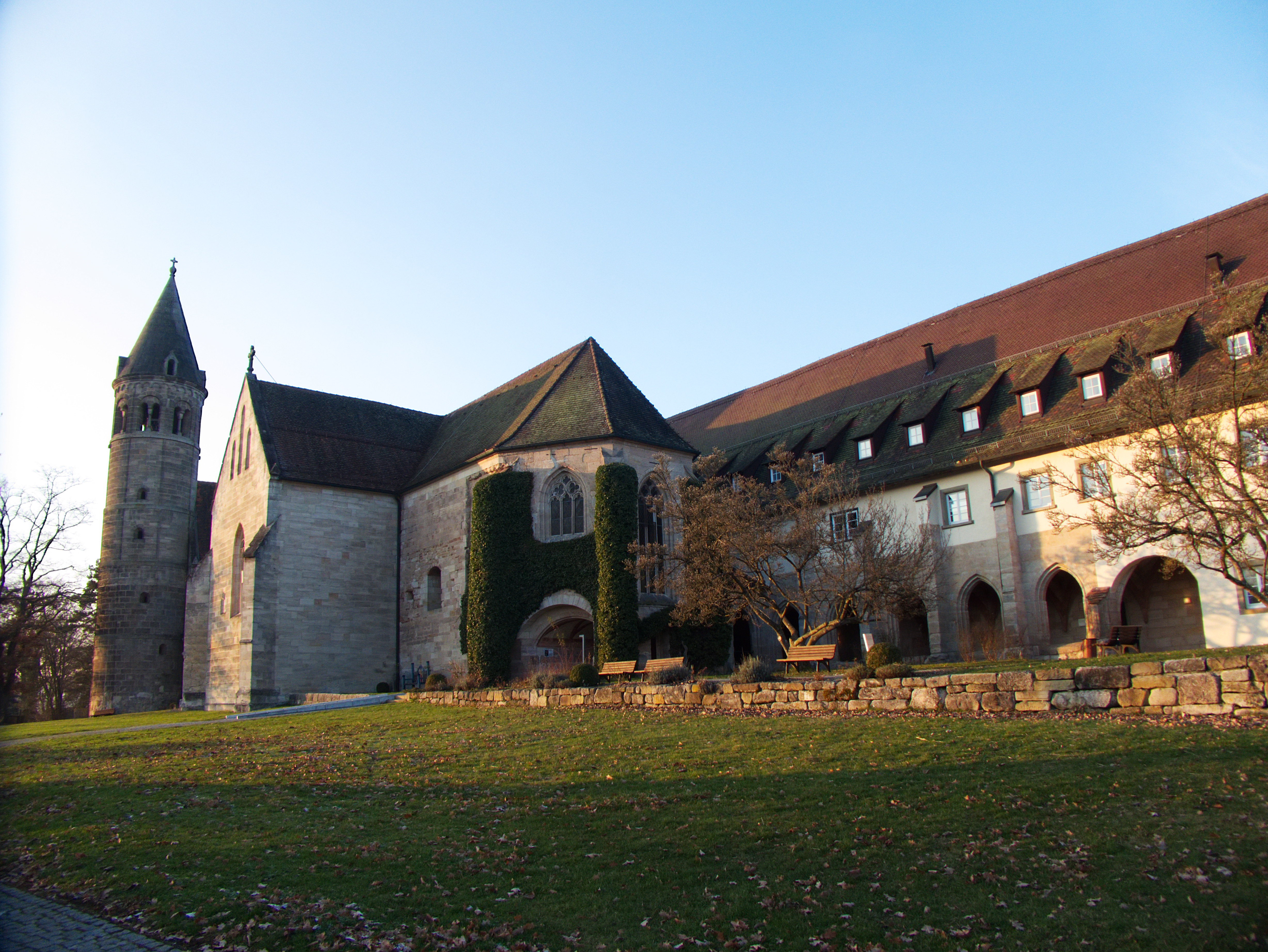 Kloster Lorch|Klosterkirche Lorch, Südostansicht